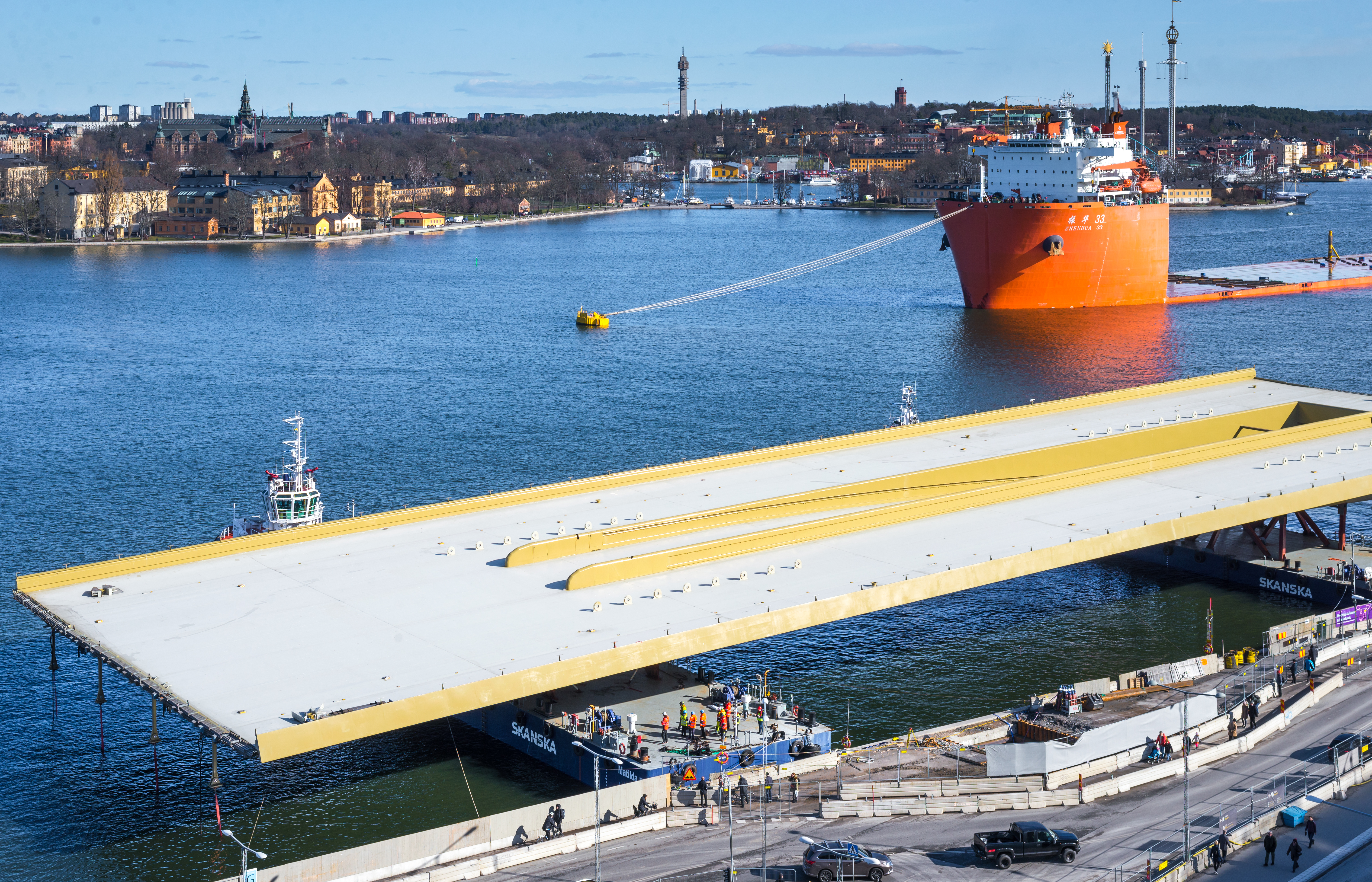 Slussens nya huvudbro "Guldbron" vid Stadsgården i Stockholm efter att ha frikopplats från transportfartyget. Liggande på pontoner inför monteringen på huvudfundamenten.